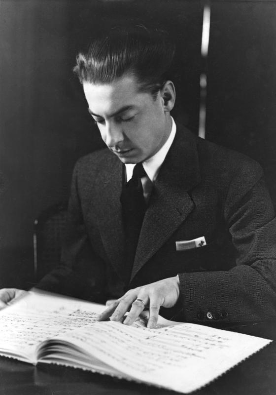 Herbert von Karajan Herbert von Karajan (Porträt) Abgebildete Personen: Karajan, Herbert von: Dirigent, Generalmusikdirektor der Wiener Staatsoper, Österreich